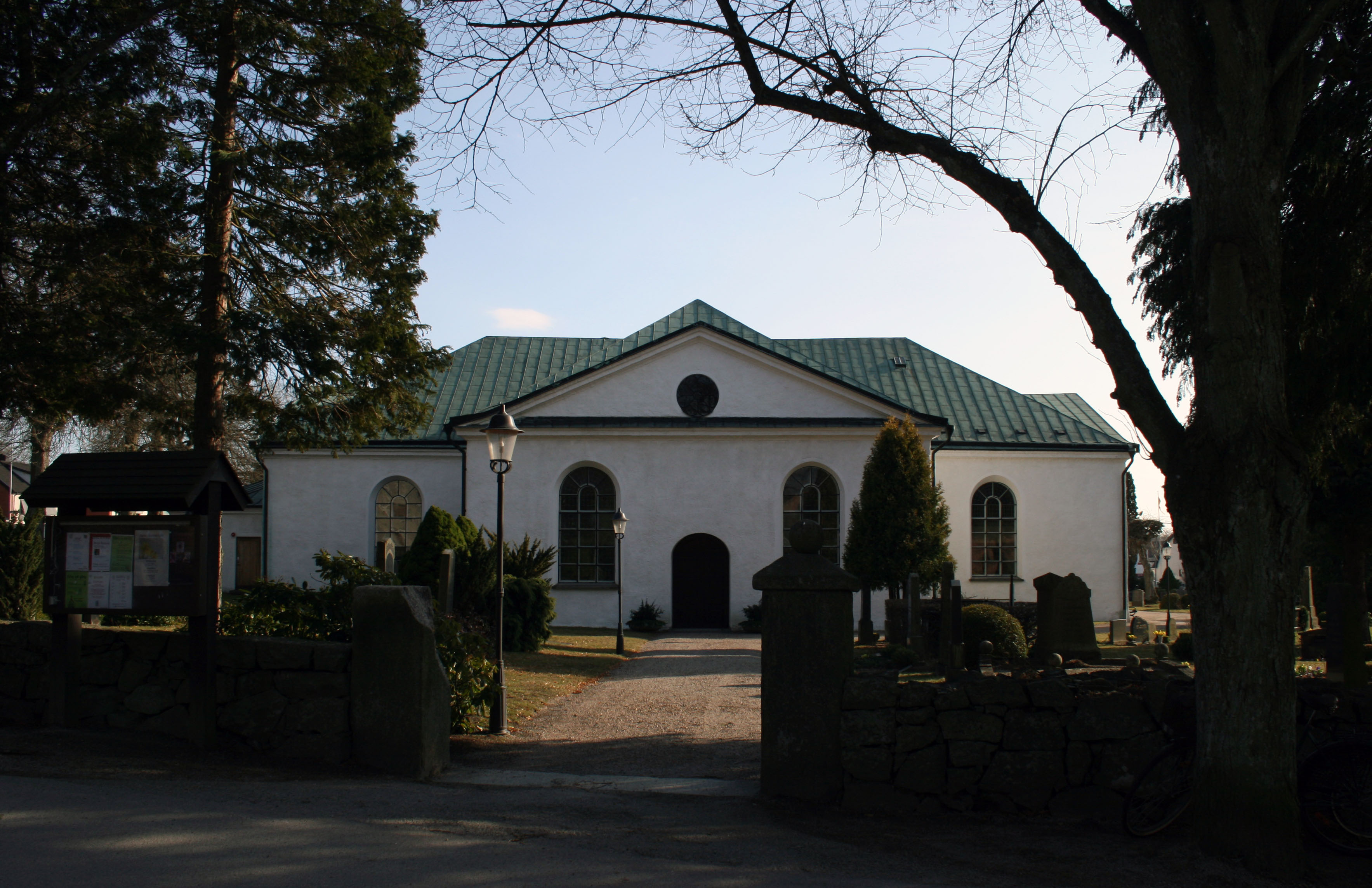 Asarums kyrka i Asarum utanför Karlshamn